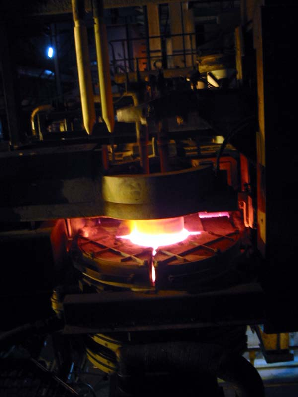 Feeder head